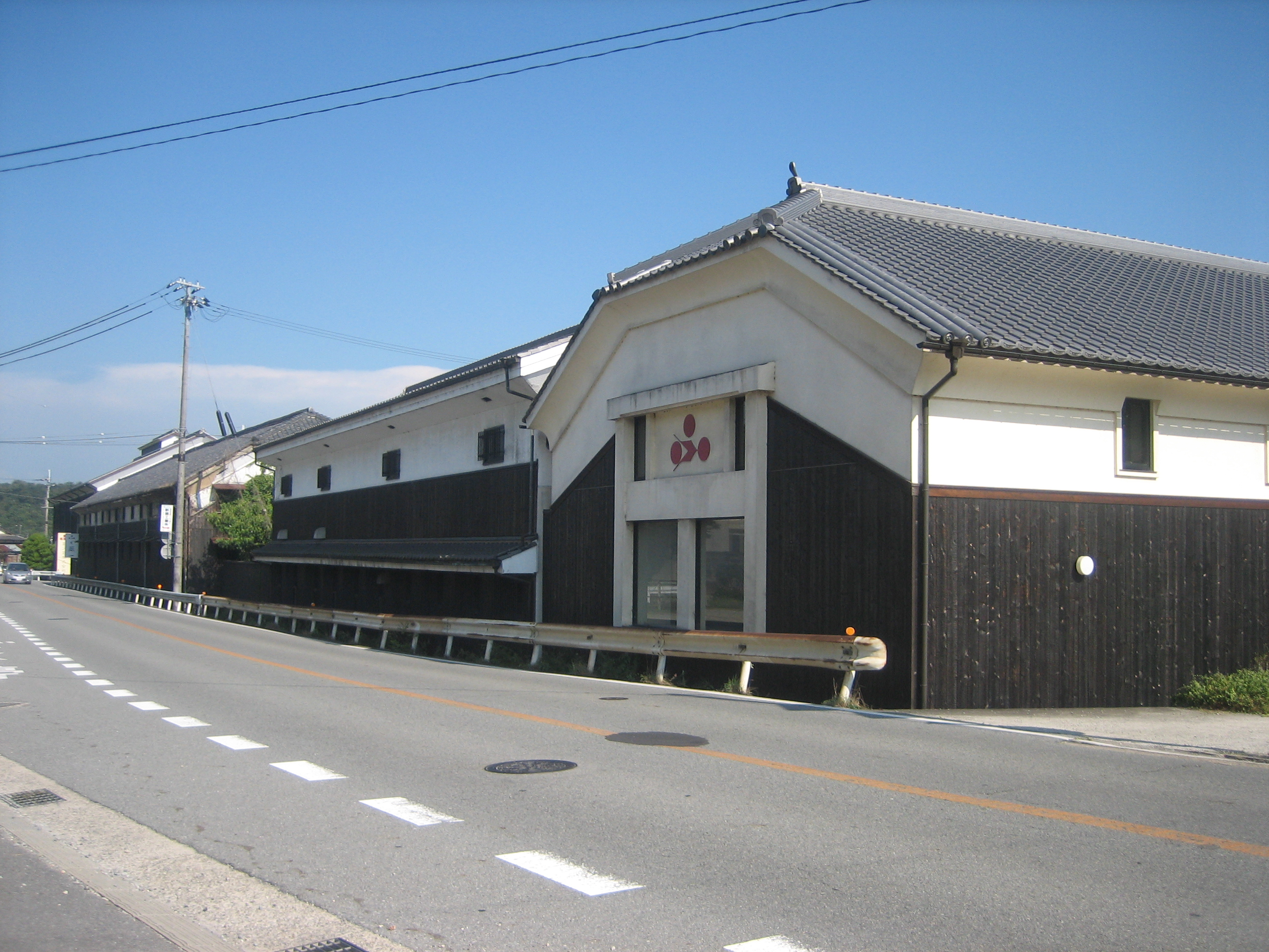 国道372号沿いおよび近辺にあるさまざまな建物など。 富久錦の酒蔵。